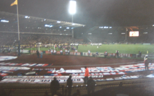 Finale de la Coupe d'Europe des vainqueurs de coupes 1996. Paris Saint-Germain-Rapid de Vienne. Qualité médiocre car il s'agit d'une photo perso sur papier numérisée. Cup winners cup final 1996, PSG-Rapid Vienna.